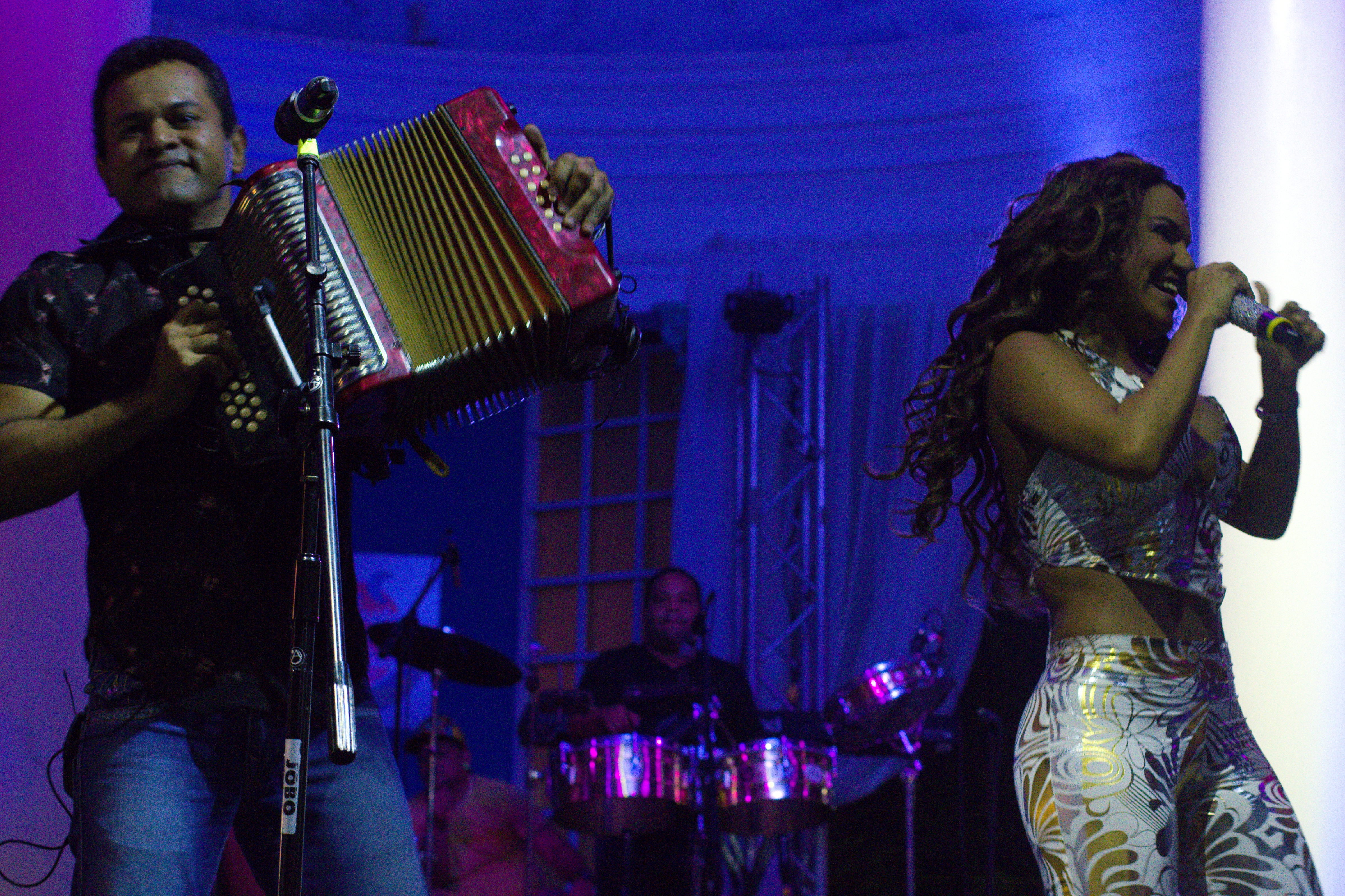 Samy y Sandra Sandoval. Cantantes panameños de música típica.